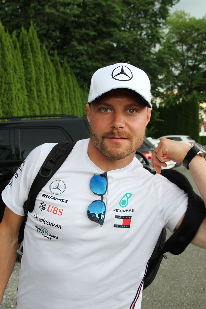 Formula 1 2019 / Schloss Gabelhofen